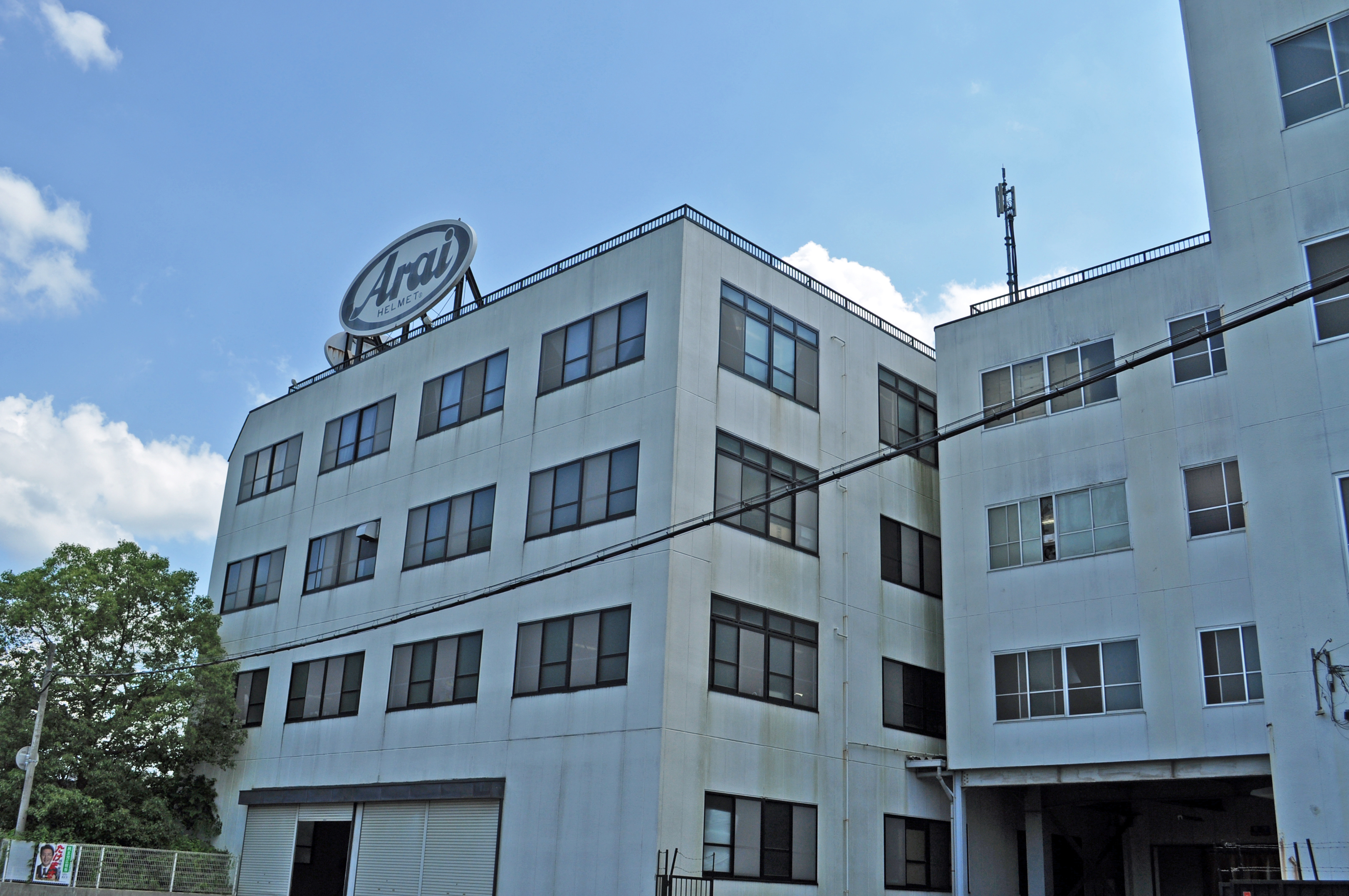 アライヘルメットの工場